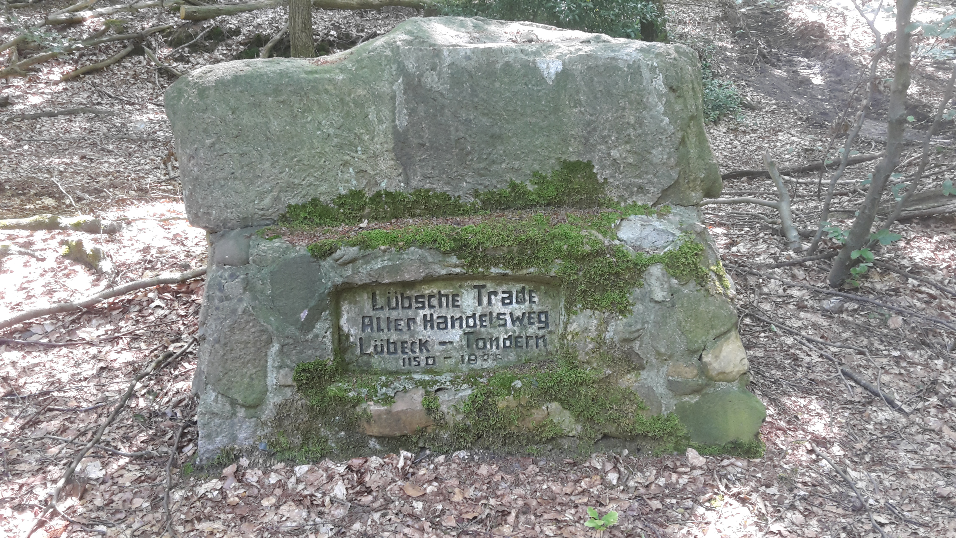 Die Lübsch Trade bei Aukrug an der B 430